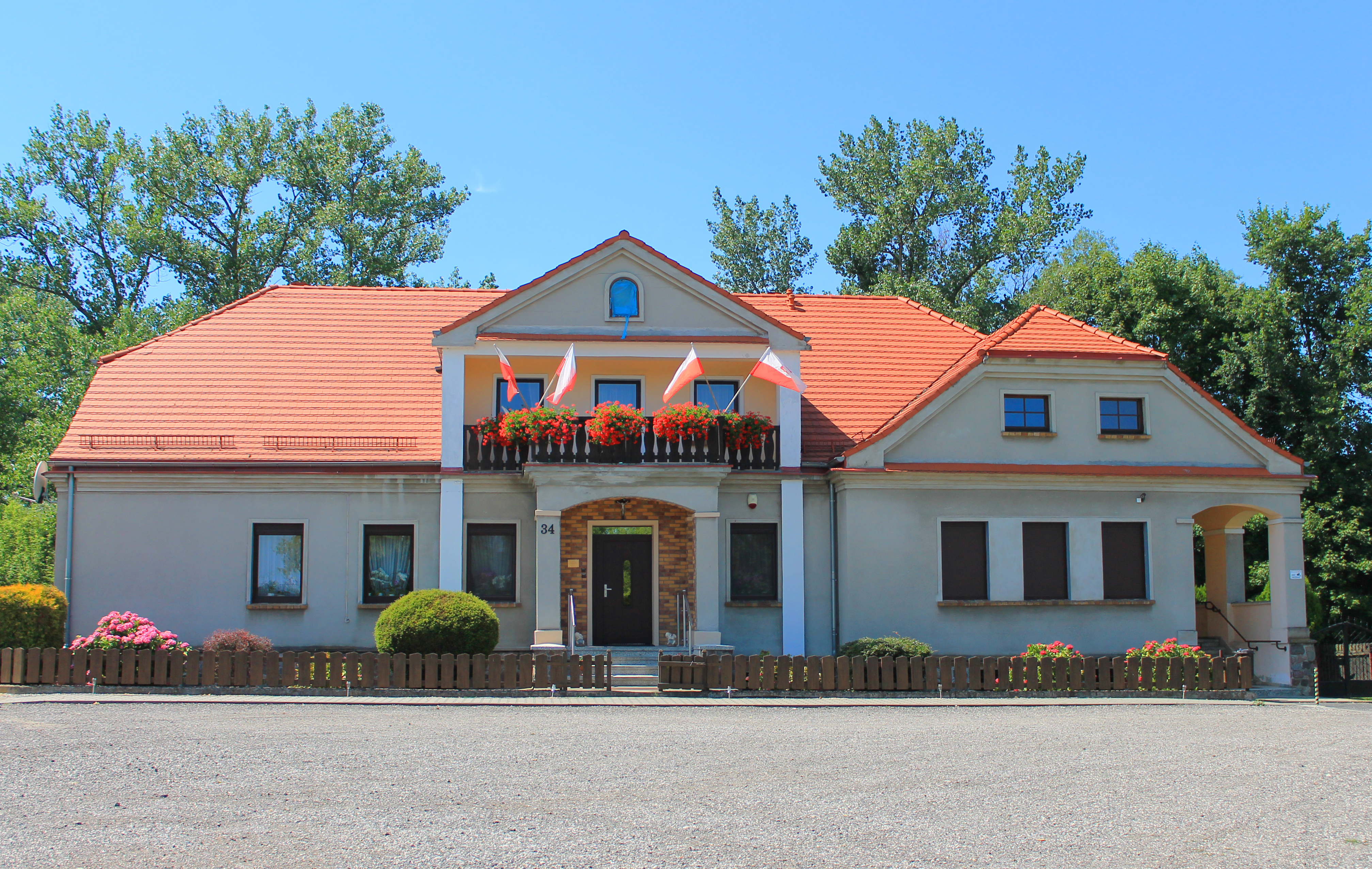 Plebania kościoła katolickiego św. Mikołaja i św. Jadwigi w Dębnicy